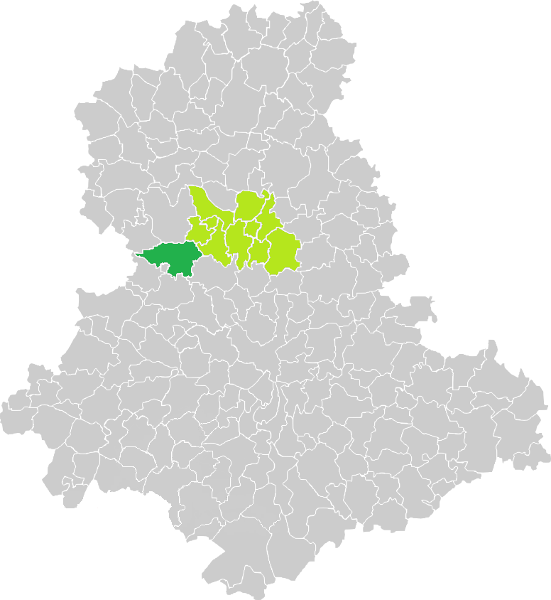 Carte de situation de la commune de Cieux (en vert foncé) dans le votre Canton (en vert clair) sur une carte des communes de la Haute-Vienne